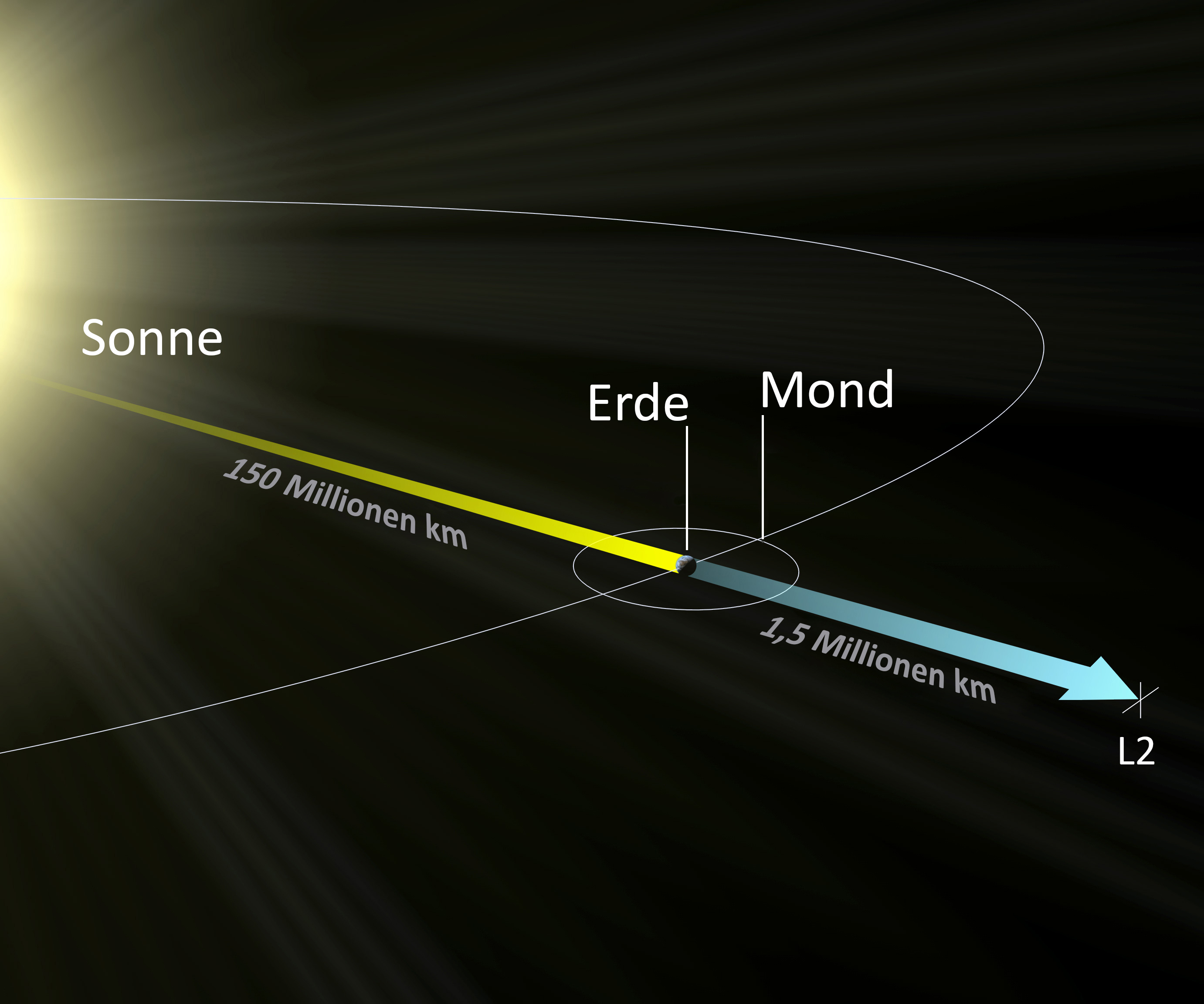 Position des 2. Lagrange-Punktes Position des Halo-Orbits des James Webb Space Telescope Geplanter Ort des Lissajous-Orbit der Gaia Raumsonde